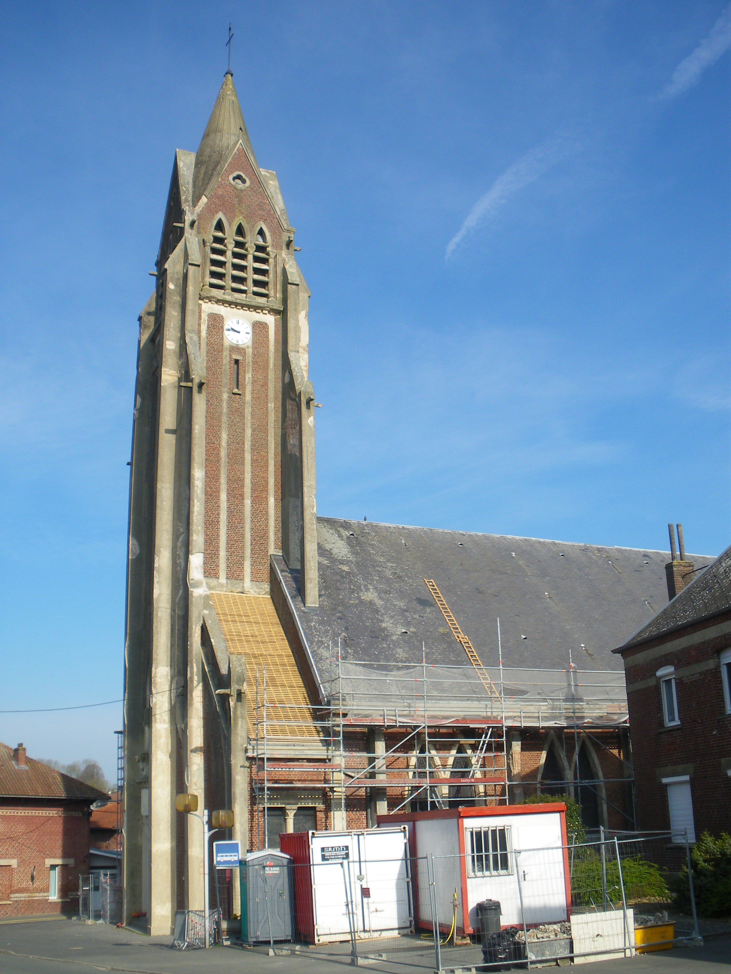 Vue de l'église Saint-Pierre de Bucquoy.